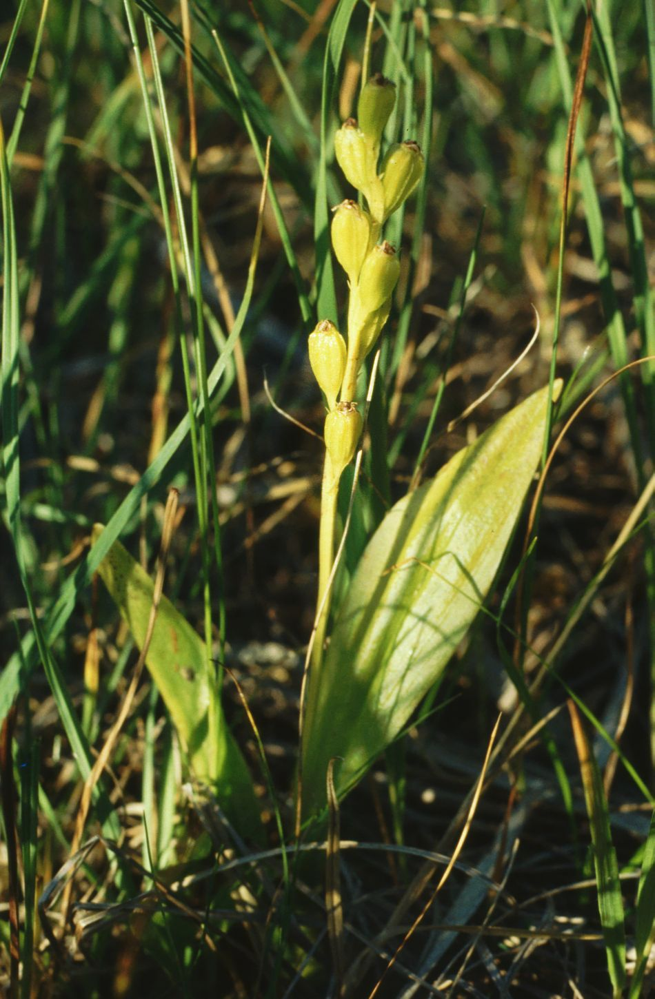 Sumpf-Glanzkraut (Liparis loeselii), Orchideen (Orchidaceae) – Lettland/Latvija/Latvia: Vidzeme, Dreimaņu ezers, „Krustkalnu rezervāts“ E Mārciena